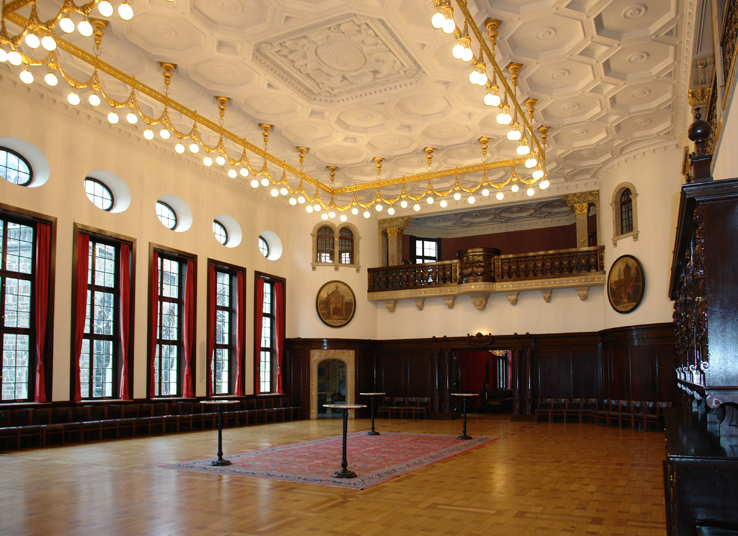 Rathaus in Bremen. Der Festsaal im Neuen Rathaus mit nach wiedergefundenen Gussformen nachgegossenem Deckenleuchter.